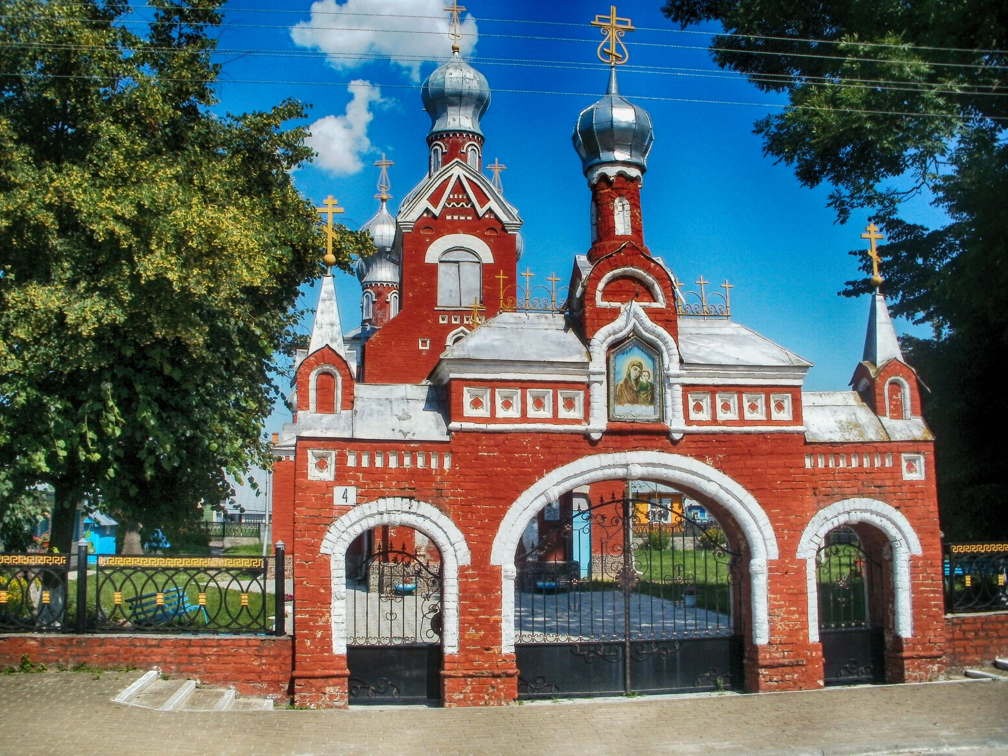 Беларуская (тарашкевіца): Давыд-Гарадок, Казанская царква